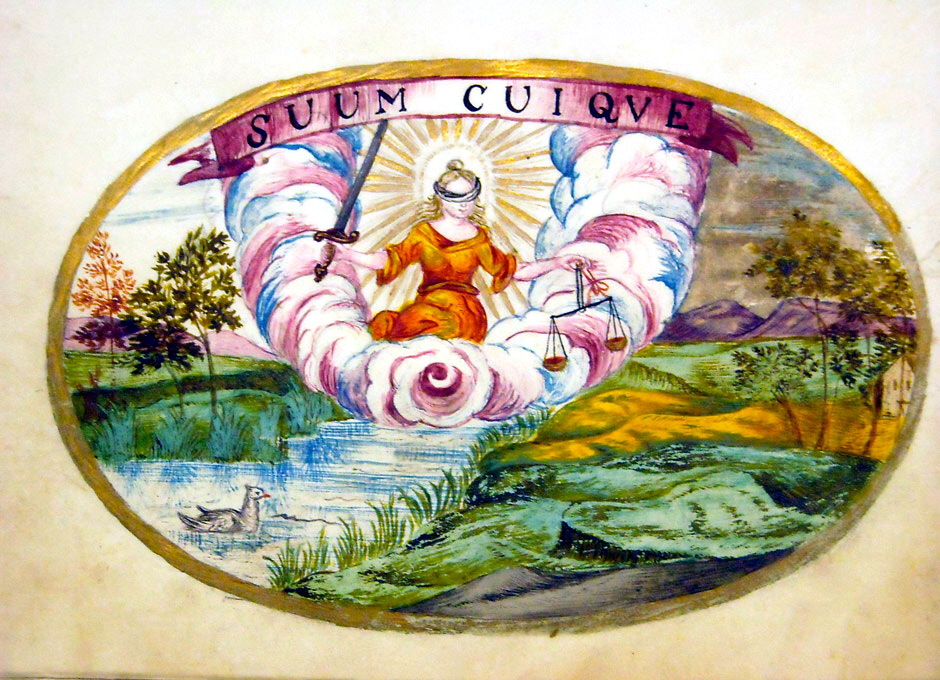 Abbildung aus dem Stammbuch des Jonas Deutschländer, 1726–1729